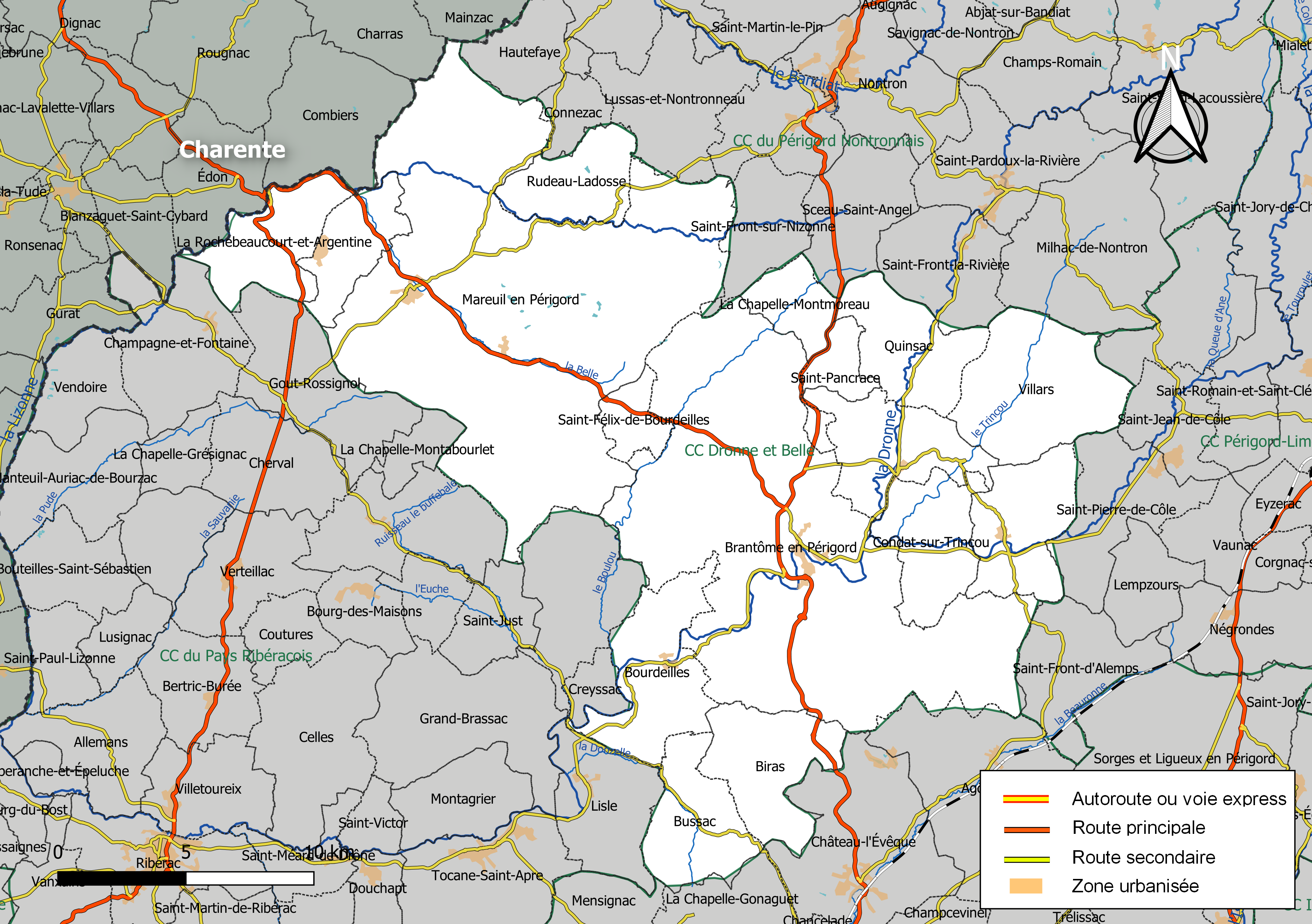 Carte géographique de la Communauté de communes Dronne et Belle, département de la Dordogne, France. Composition au 1er janvier 2019.